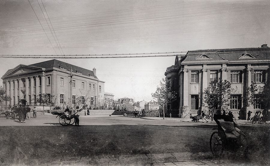 青岛堂邑路馆陶路市场一路路口